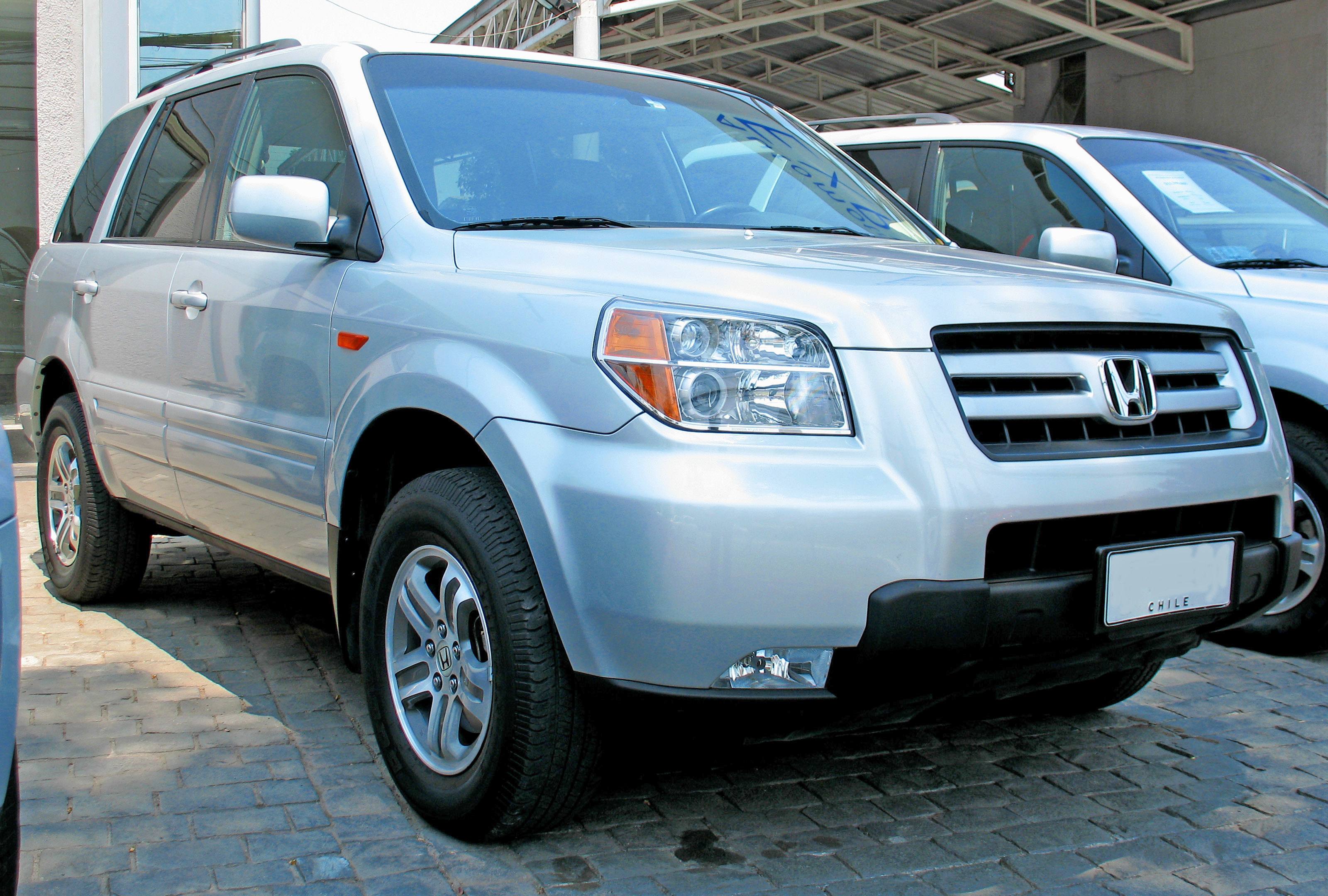 Honda Pilot EX 4WD 2008